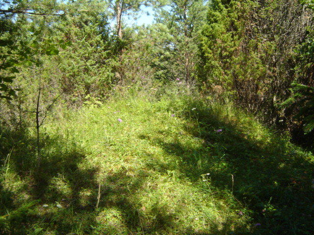 Maalinna kinnikasvand müürid